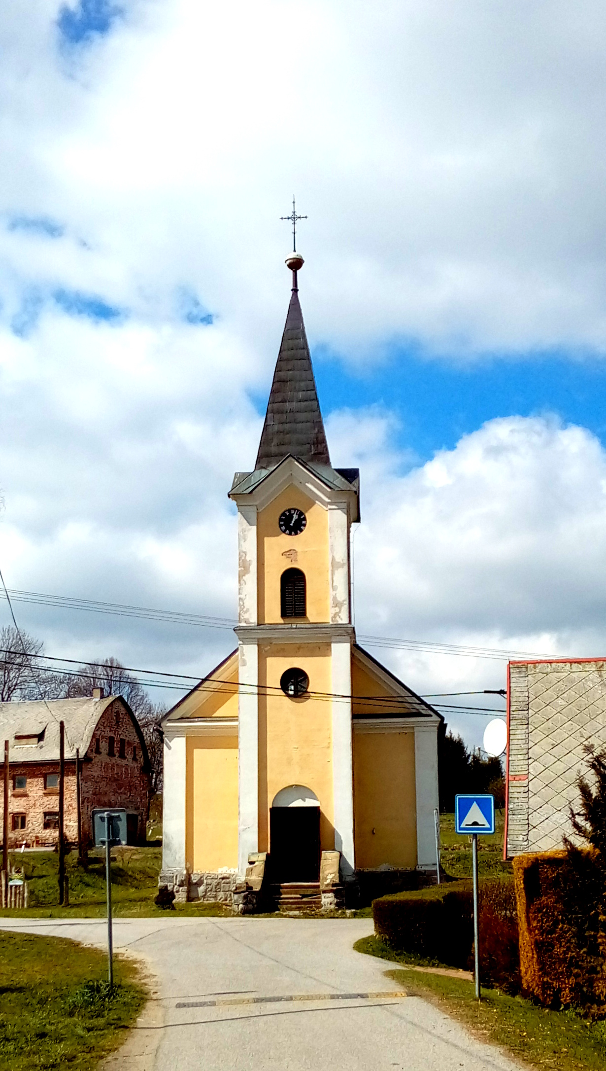 Královec, kościół pw. św. Jana Nepomucena